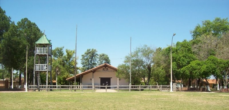 Templo histórico de Laureles